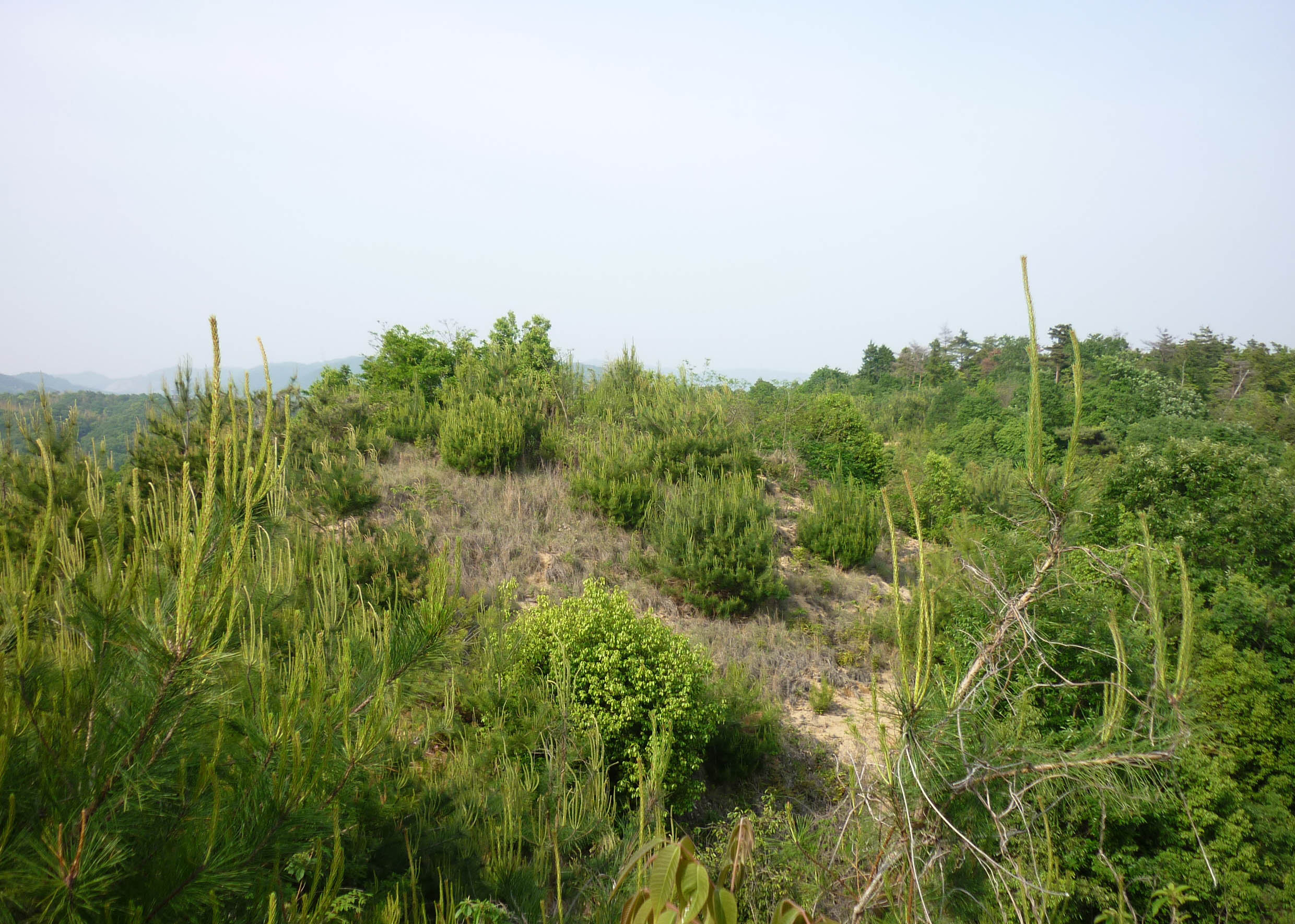 本丸跡